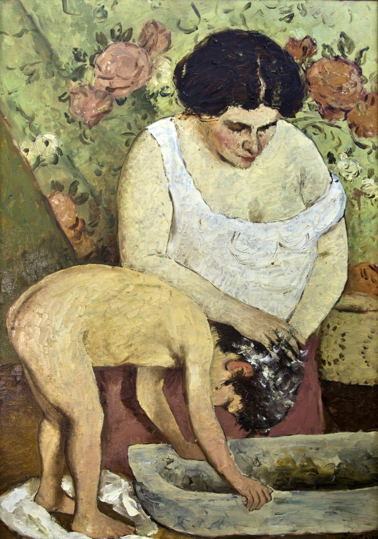 Lăutul